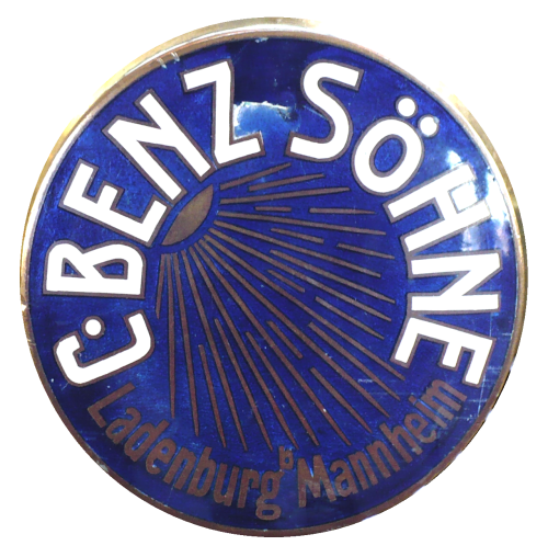 C.Benz Soehne Logo in Ladenburg